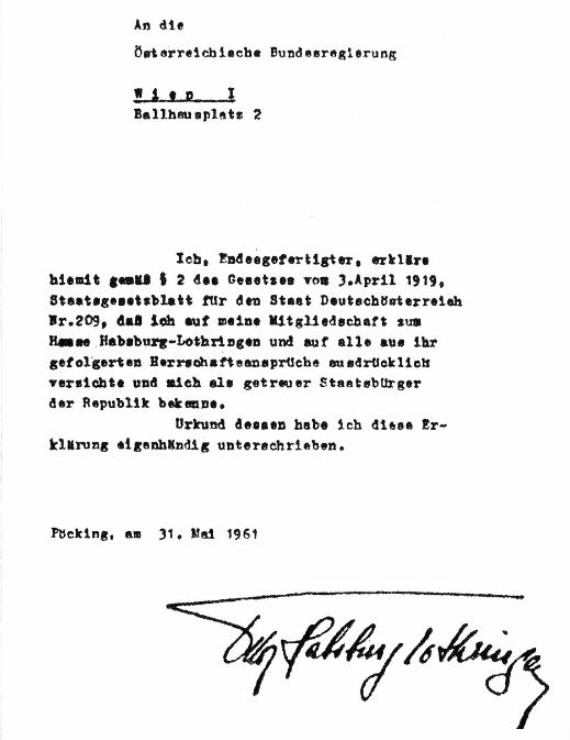 Erklärung von Otto Habsburg-Lothringen an die österreichische Bundesregierung über seinen Verzicht der Mitgliedschaft zum Hause Habsburg und auf Herrschaftsansprüche sowie des Bekenntnisses als getreuer österreichischer Staatsbürger gemäß dem Gesetz vom 3. April 1919, betreffend die Landesverweisung und die Übernahme des Vermögens des Hauses Habsburg-Lothringen, StGBl. für den Staat Österreich, Nr. 209/1919, 71. Stück, ausgegeben am 10. April 1919 (heute kurz „Habsburgergesetz“), unter wörtlicher Übernahme der Formulierungen (sic!) des § 2. Die Unterschrift des Unterzeichners ohne Bindestrich zwischen den Namensteilen Habsburg und Lothringen hat nicht seinem österreichischen amtlichen Namen Habsburg-Lothringen entsprochen.